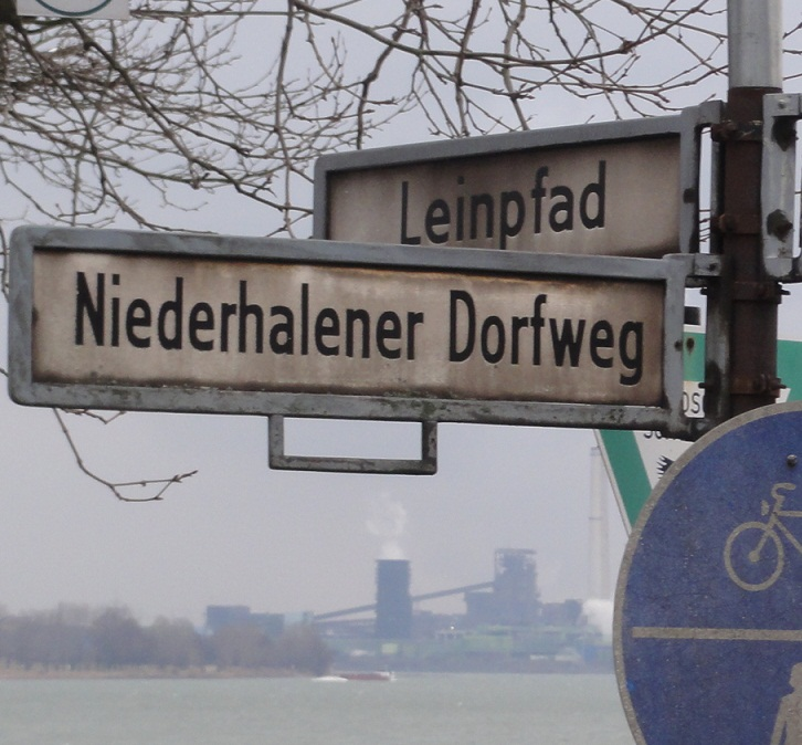 Halen Dorfweg der sich im Nirgendwo am Ufer verläuft